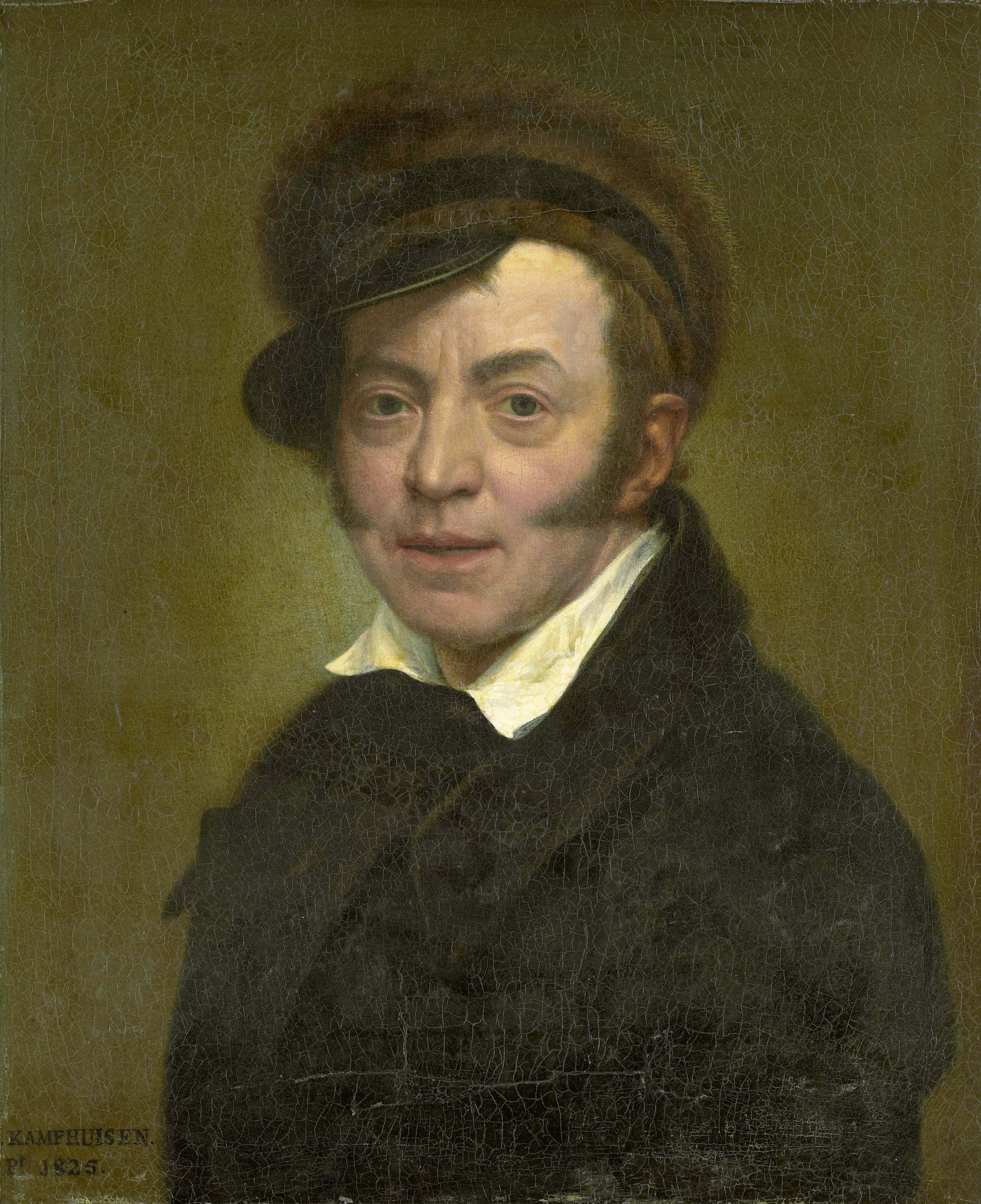 Zelfportret van de schilder Jan Kamphuysen, buste met een bonten pet op het hoofd.